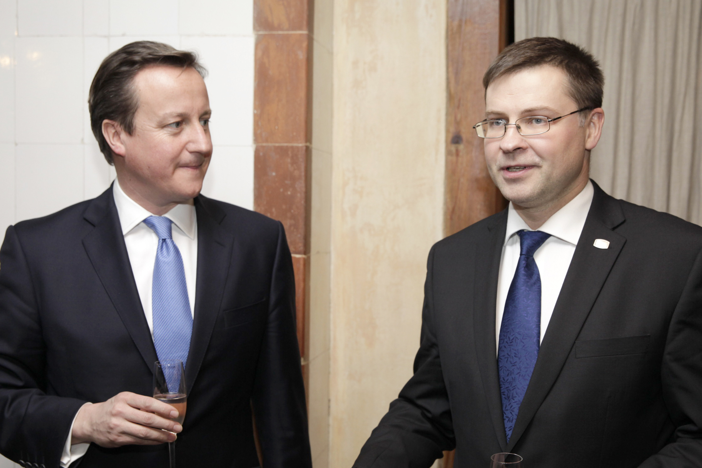 Ministru prezidens Valdis Dombrovskis un Apvienotās Karalistes Ministru prezidents Deivids Kamerons